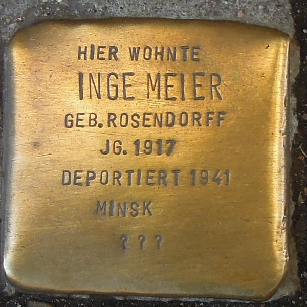 Stolpersteine in Hamburg-Bergedorf Inge Meier